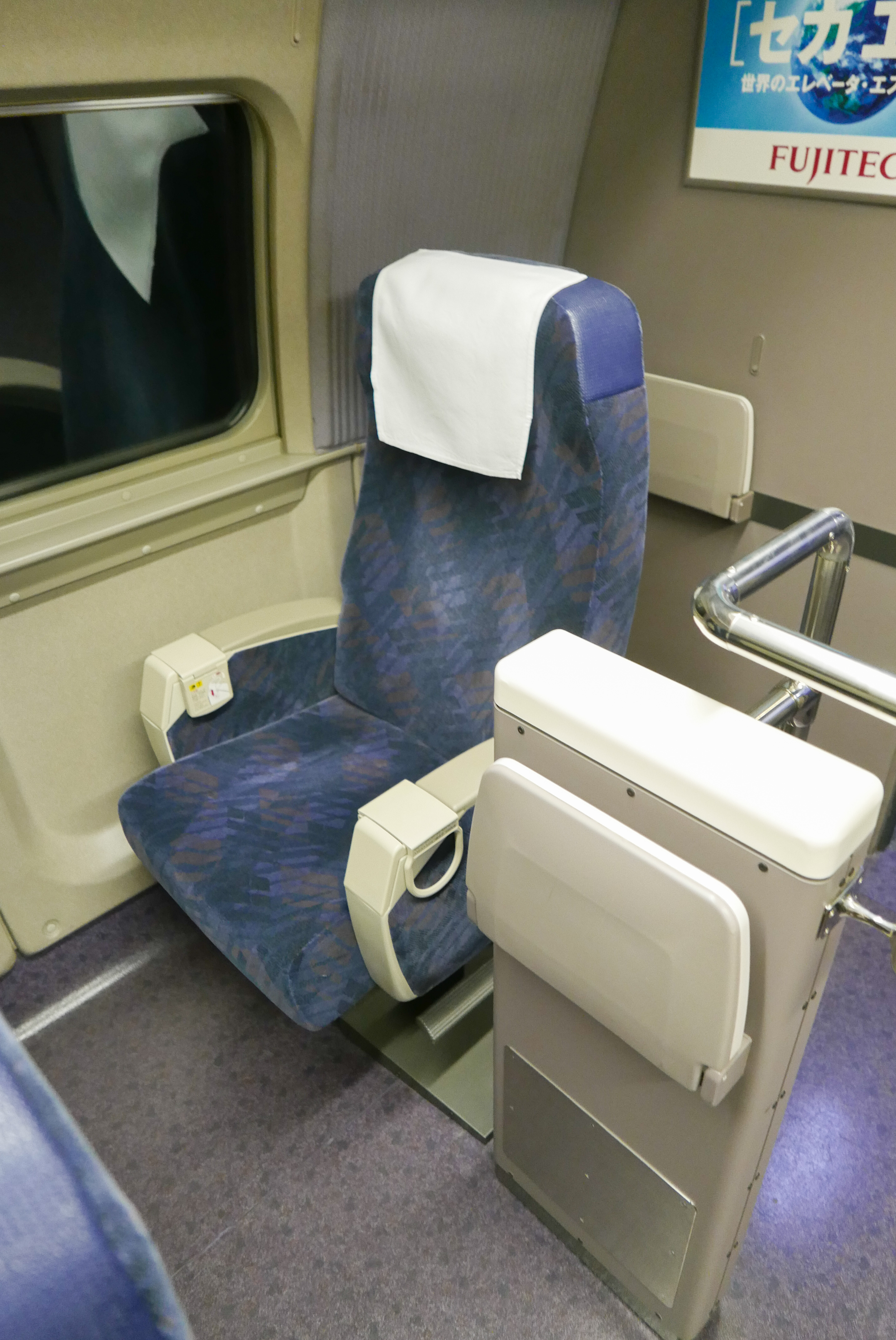 500系V編成、再改造後のシングルシート